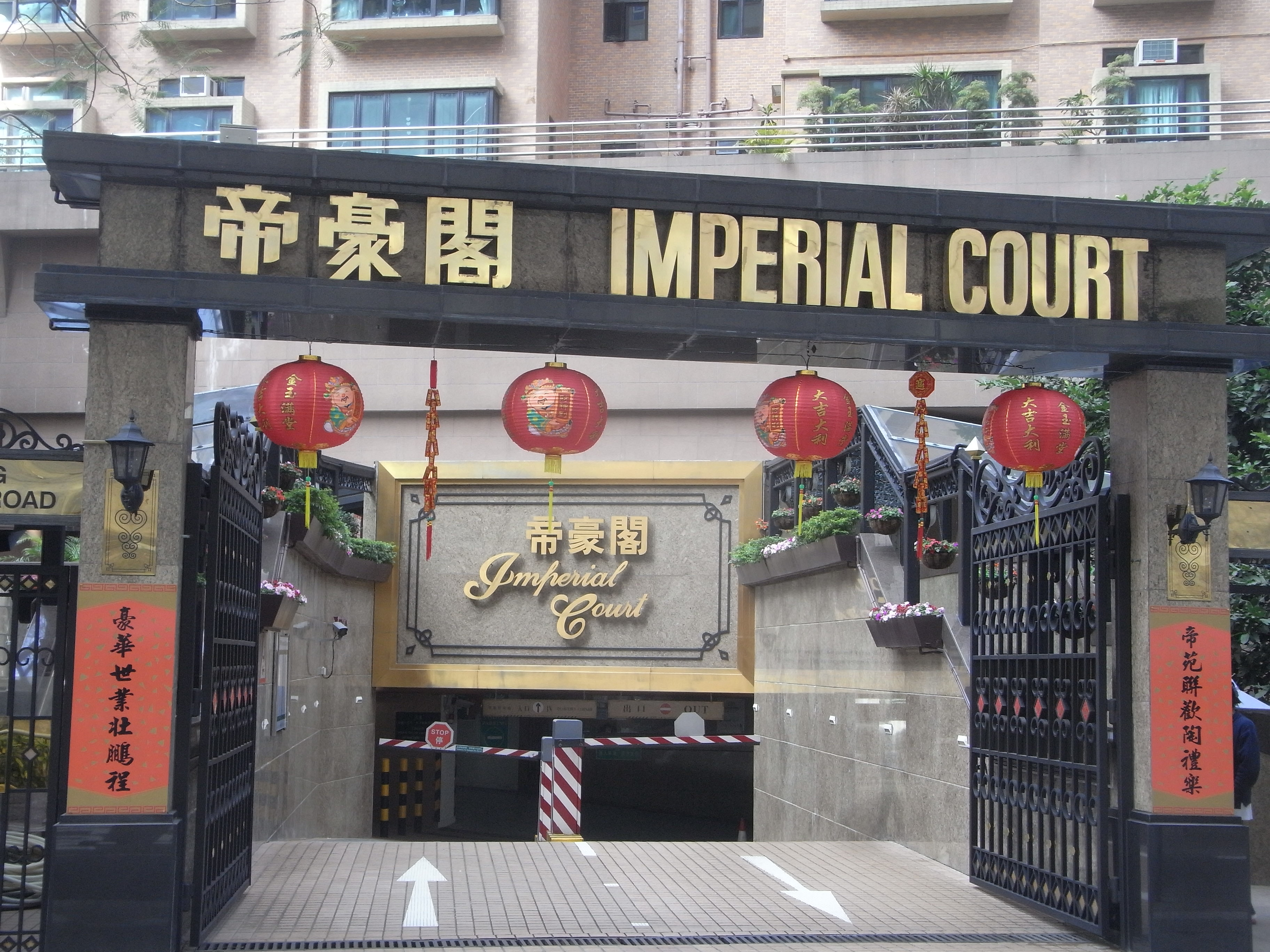 中文（香港）: 香港島干德道帝豪閣